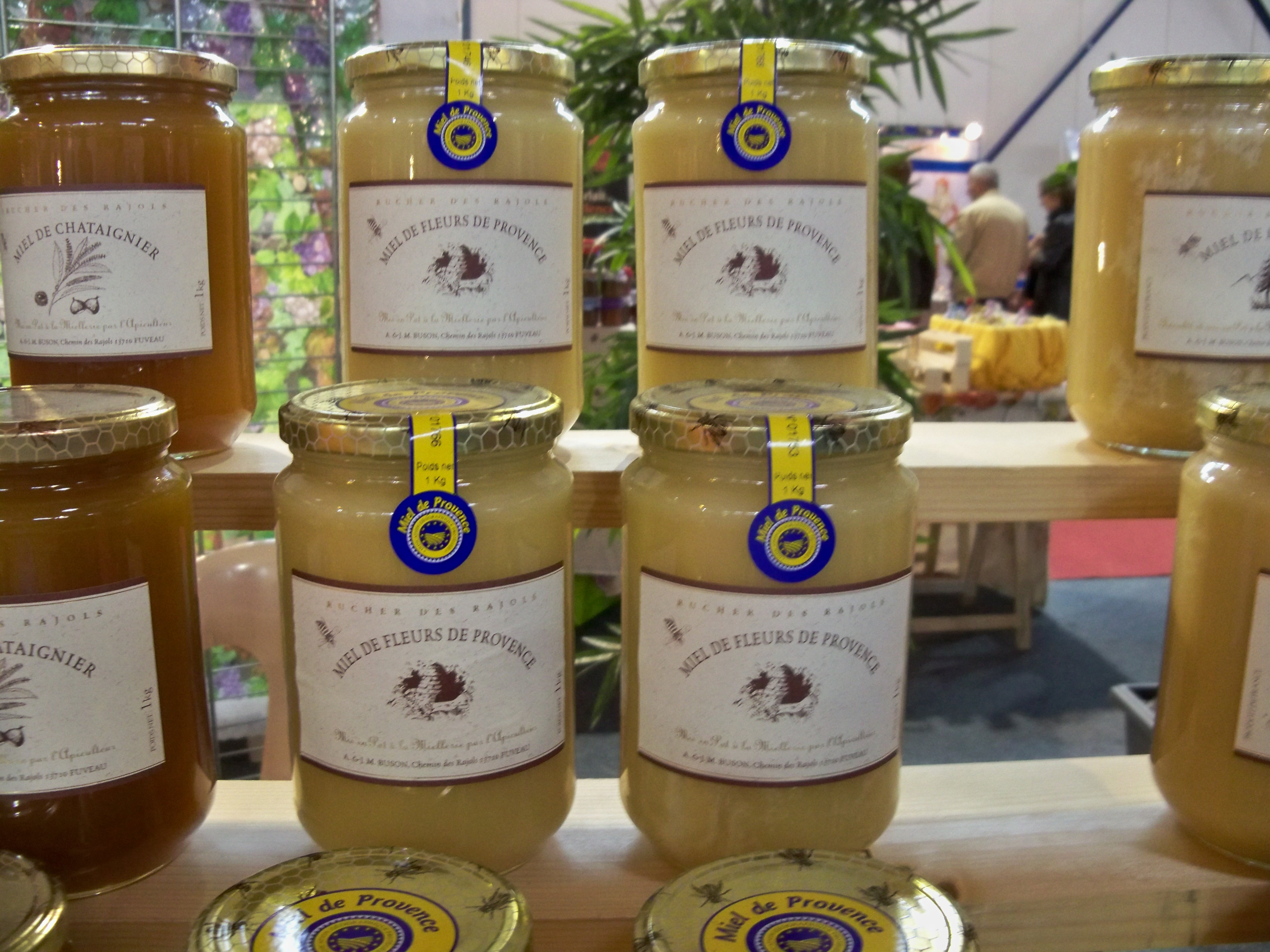 Miel de Provence